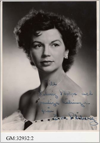 Eva Stiberg 1944.